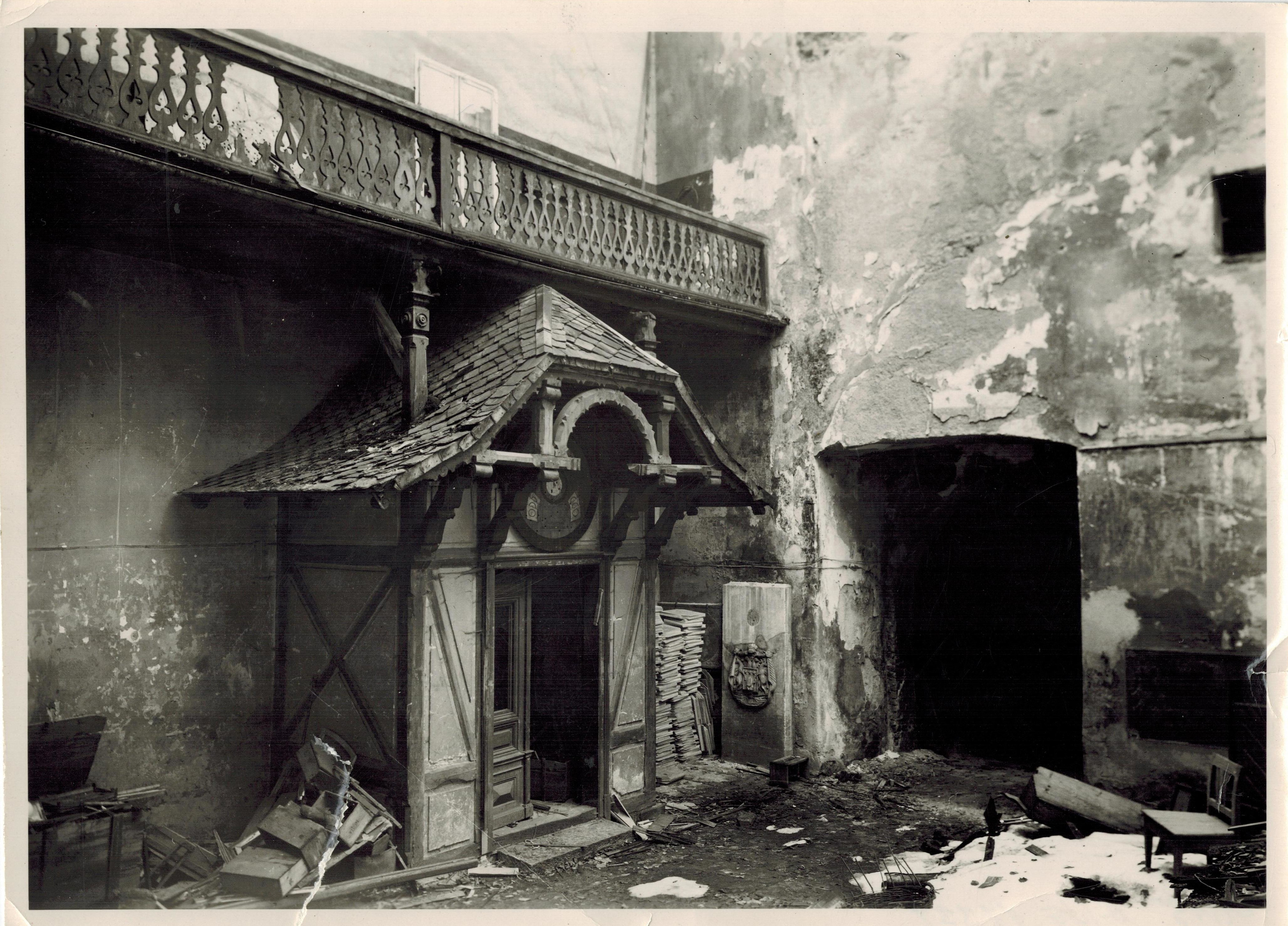 Museum of Jeseník Region (1951)